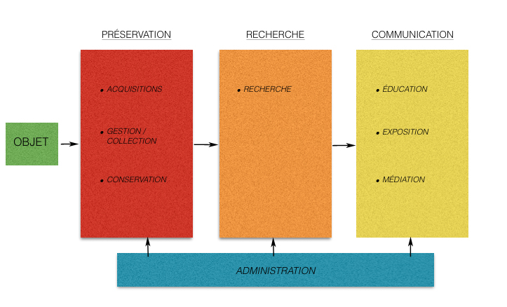 modèle pensé par La Rainwardt academy au Pays-Bas Préservation/Recherche/Communication qui constituent les trois fonctions indissociables du musée et qui interagissent avec leur contexte, où les différentes fonctions sont plus ou moins importantes selon les différentes politiques. Ce modèle peut s’illustrer selon un schéma de type « blackbox »